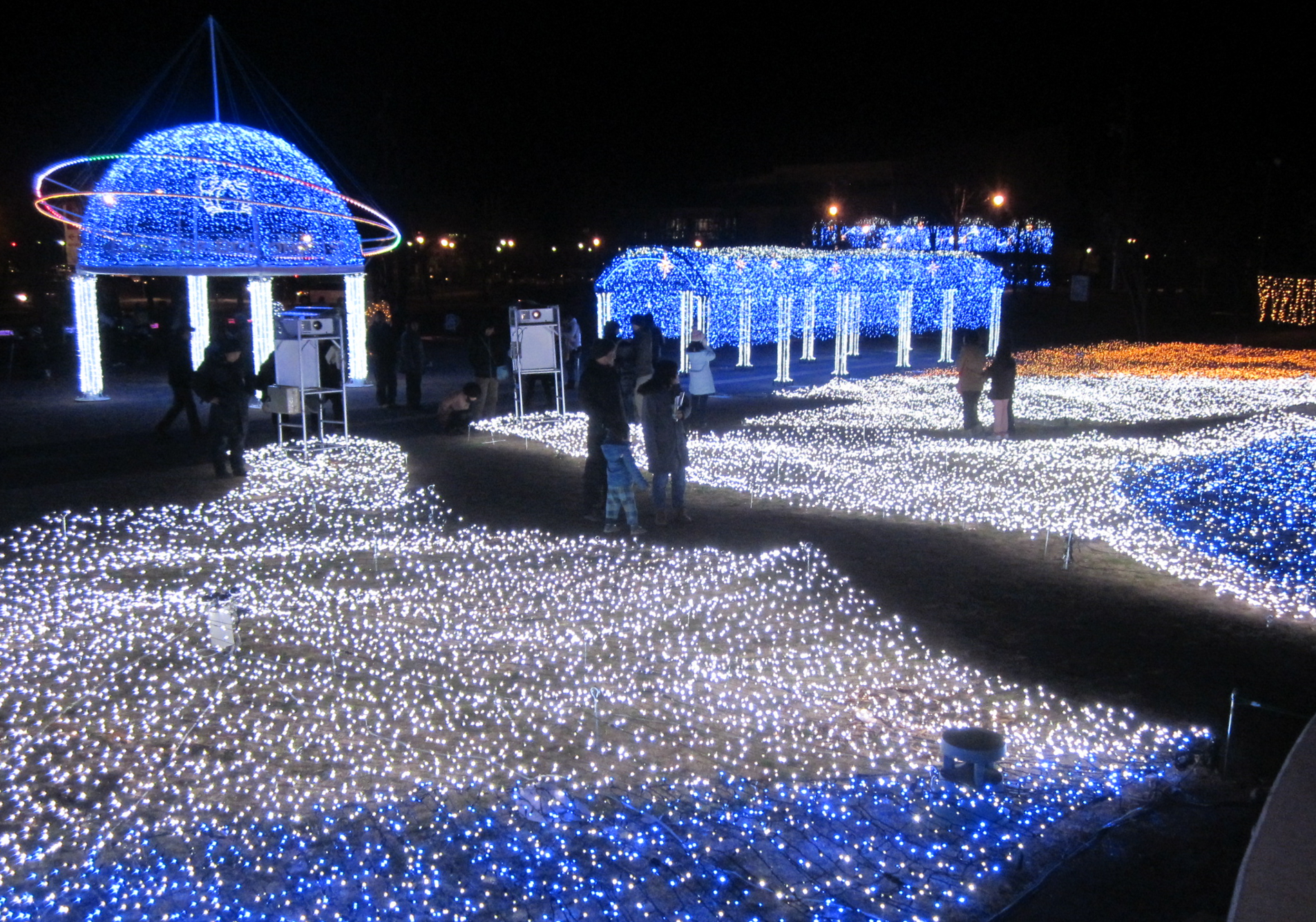 Sakubloom